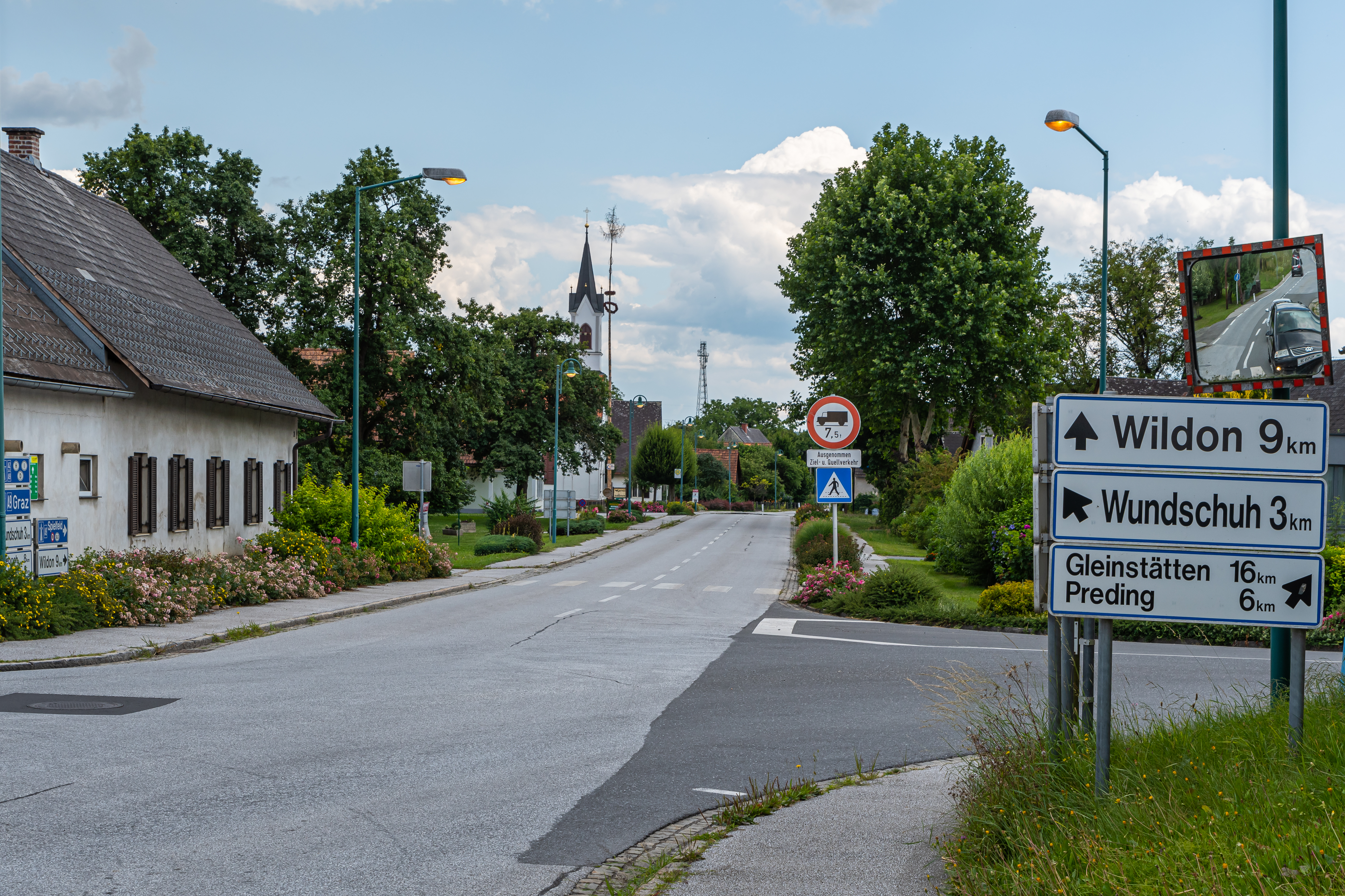 Ansicht der Ortschaft Zwaring-Pöls von der Kreuzung der L603 mit der L380 / L303 mit der denkmalgeschützen Ortskapelle von Zwaring. Zwaring-Pöls